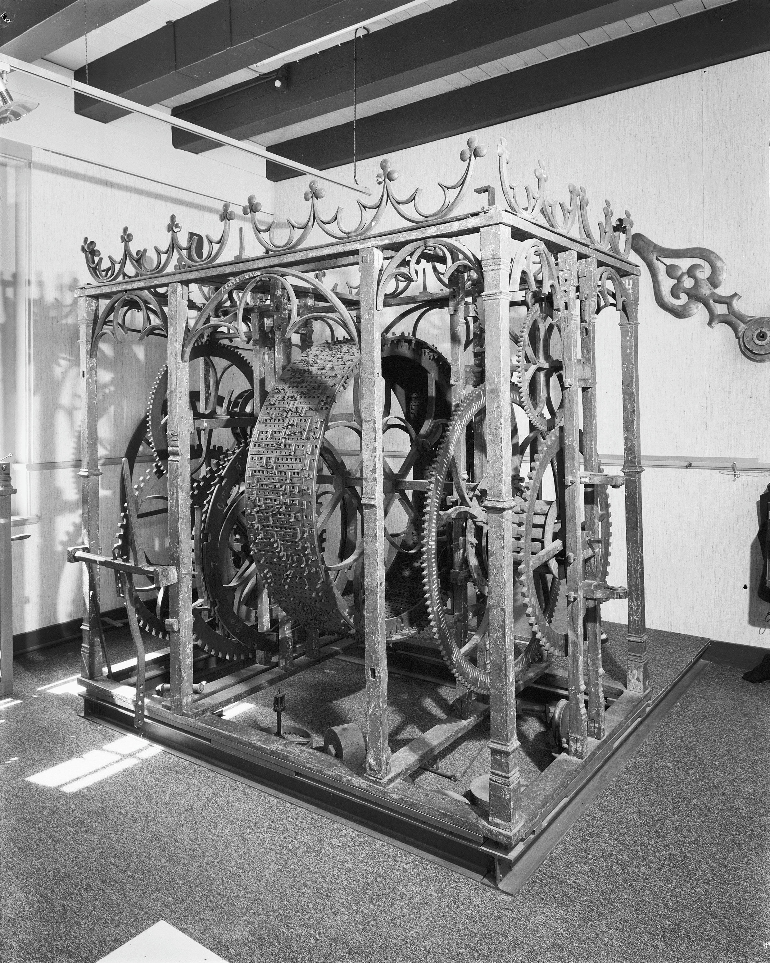 Sint Jacobskerk: torenuurwerk en speelwerk afkomstig uit de Haagsetoren en aanwezig in het museum speelklok te Utrecht